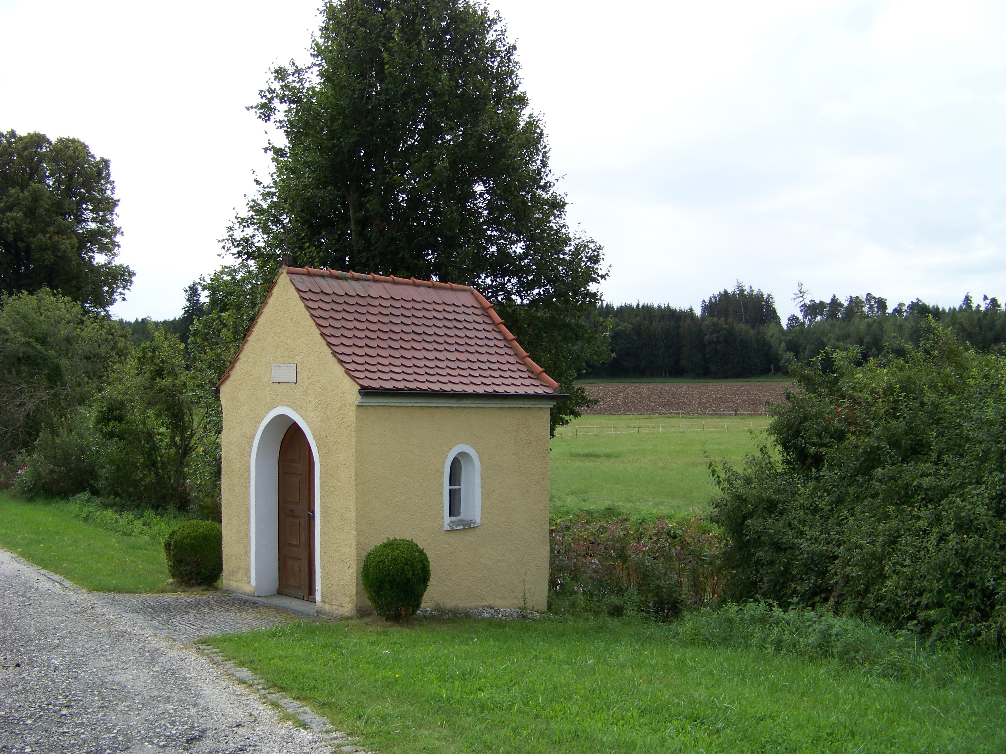 Kröning, Dietrichstetten 1, Ortsteil Aumühle. Kapelle. Kleiner massiver Satteldachbau, klassizistisch, bezeichnet 1847; mit Ausstattung.